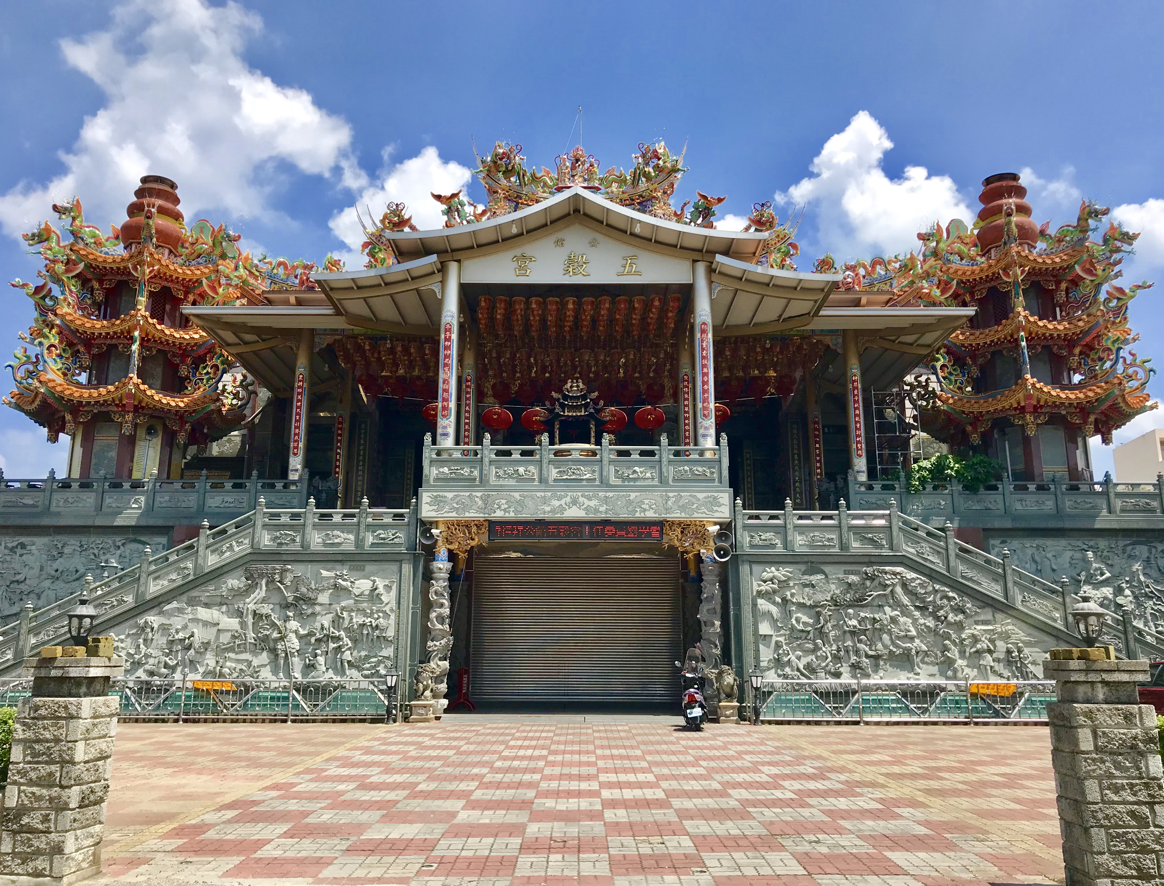 公館五穀宮正面照